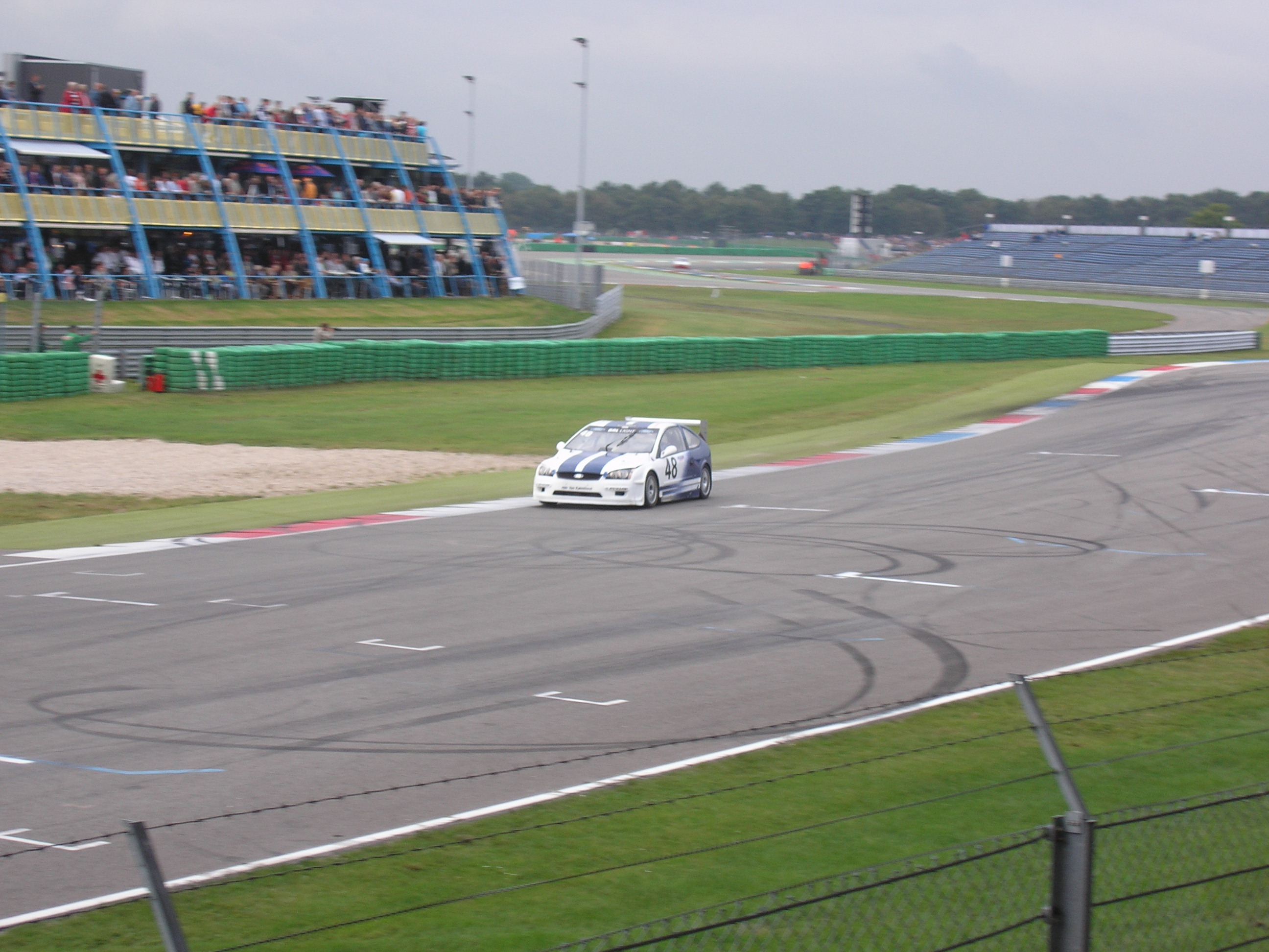 De BRL Light